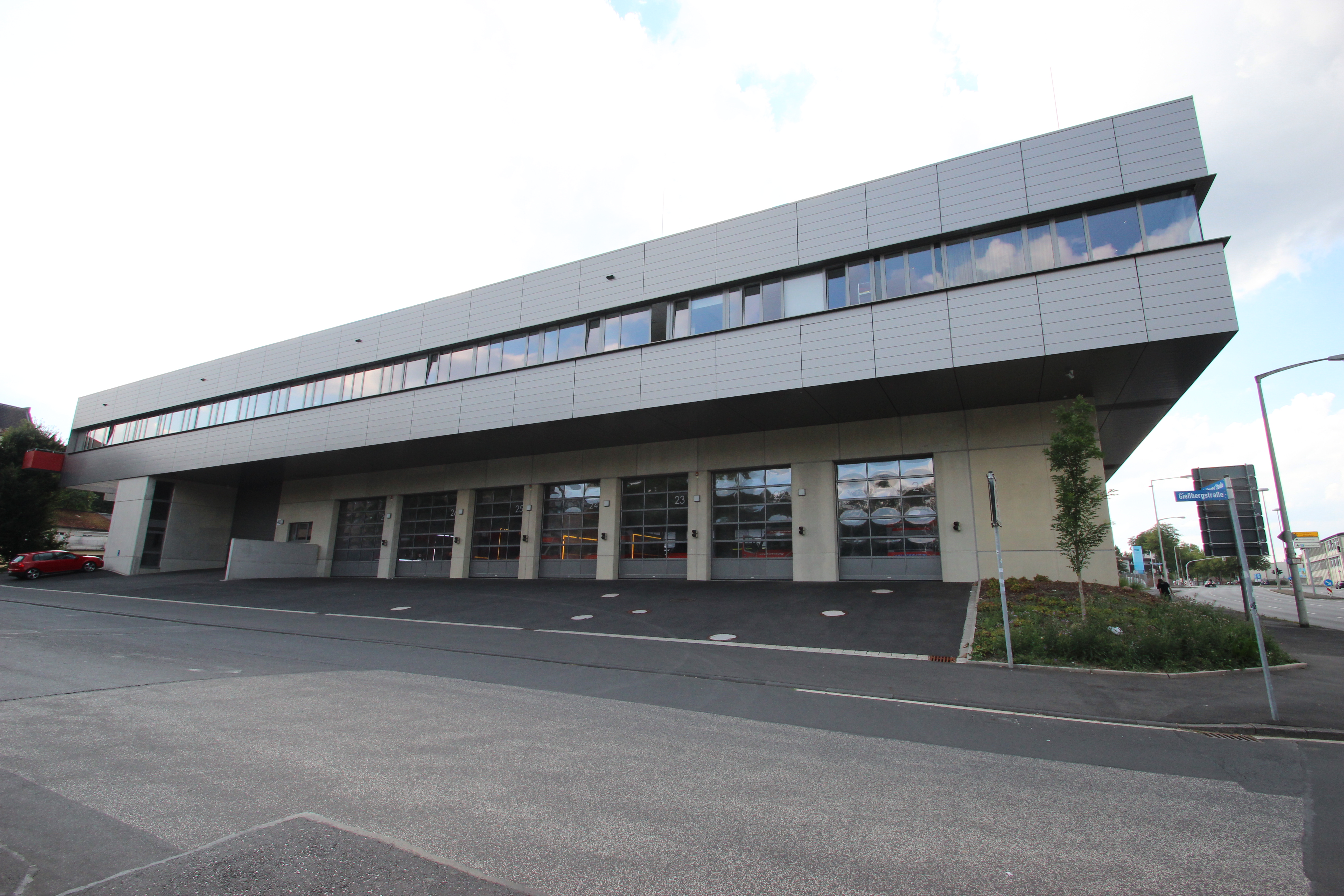 Wache 1 der Feuerwehr Kassel.